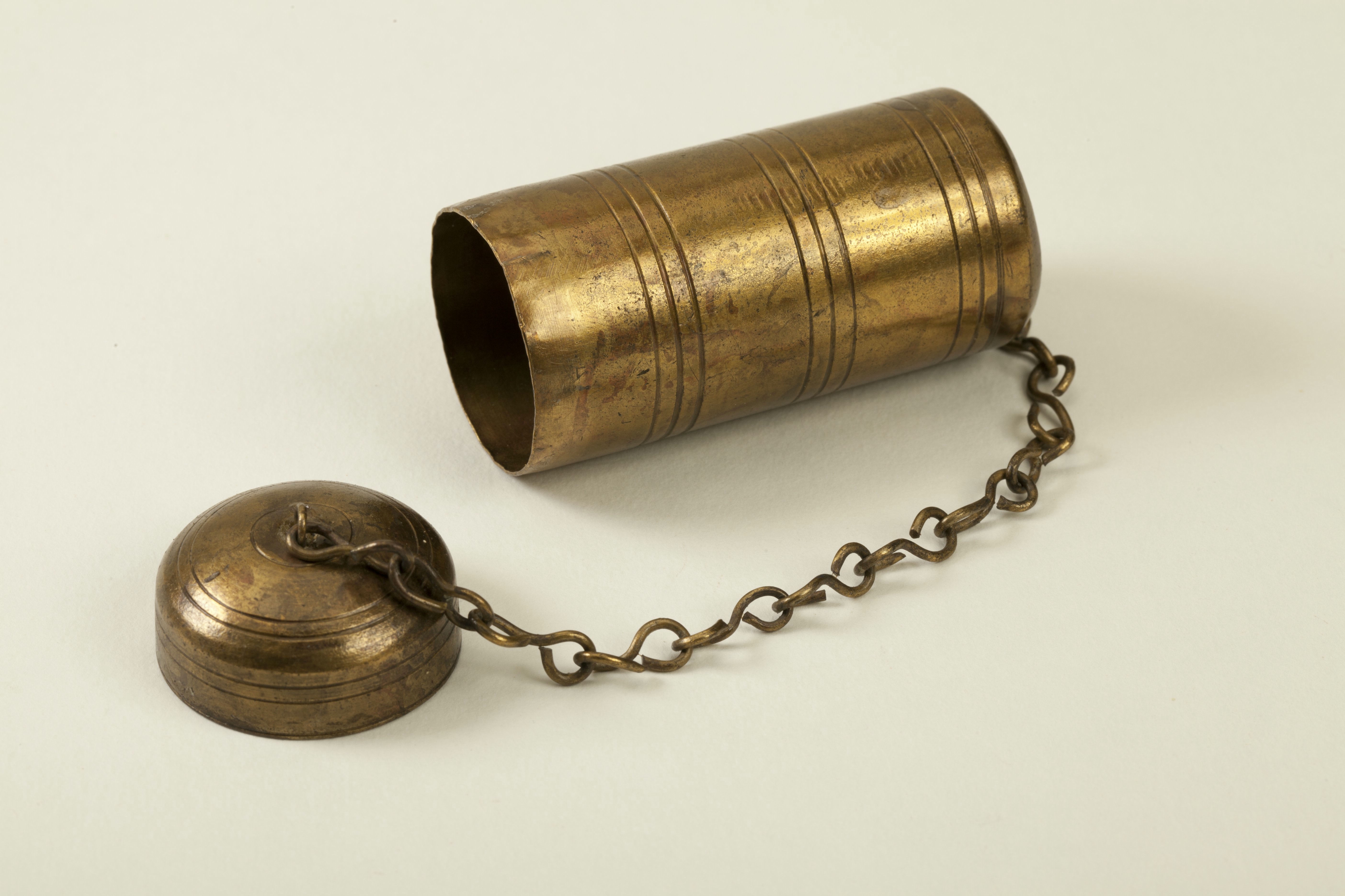 tondeldoos met afneembare dop aan ketting en opdrukbodem Objectnummer: [MA]ZO1965-II211 Materiaal: Koper